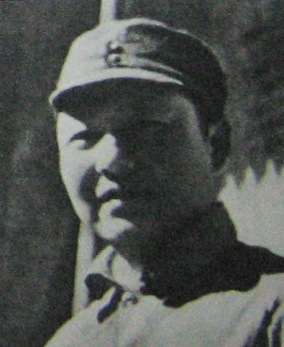 Xi Zhongxun (习仲勋) in 1946. 时任陕甘宁晋绥联防军政治委员的习仲勋。